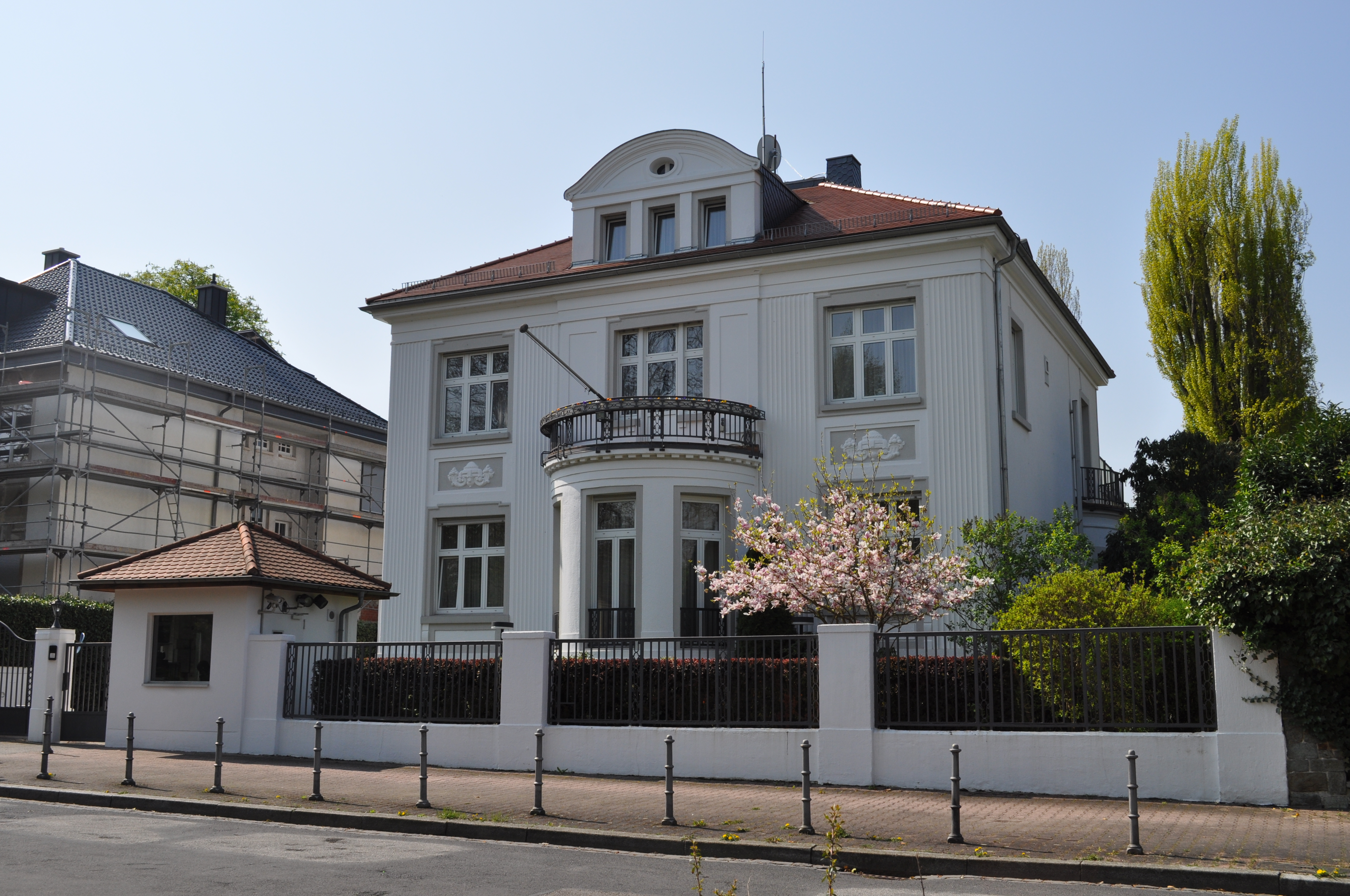 Frankfurt, Zeppelinallee 107, Wohnsitz des amerikanischen Generalkonsuls; Architekt Wilhelm Derlam (1877-1948)